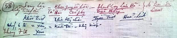 Comment HCThuy